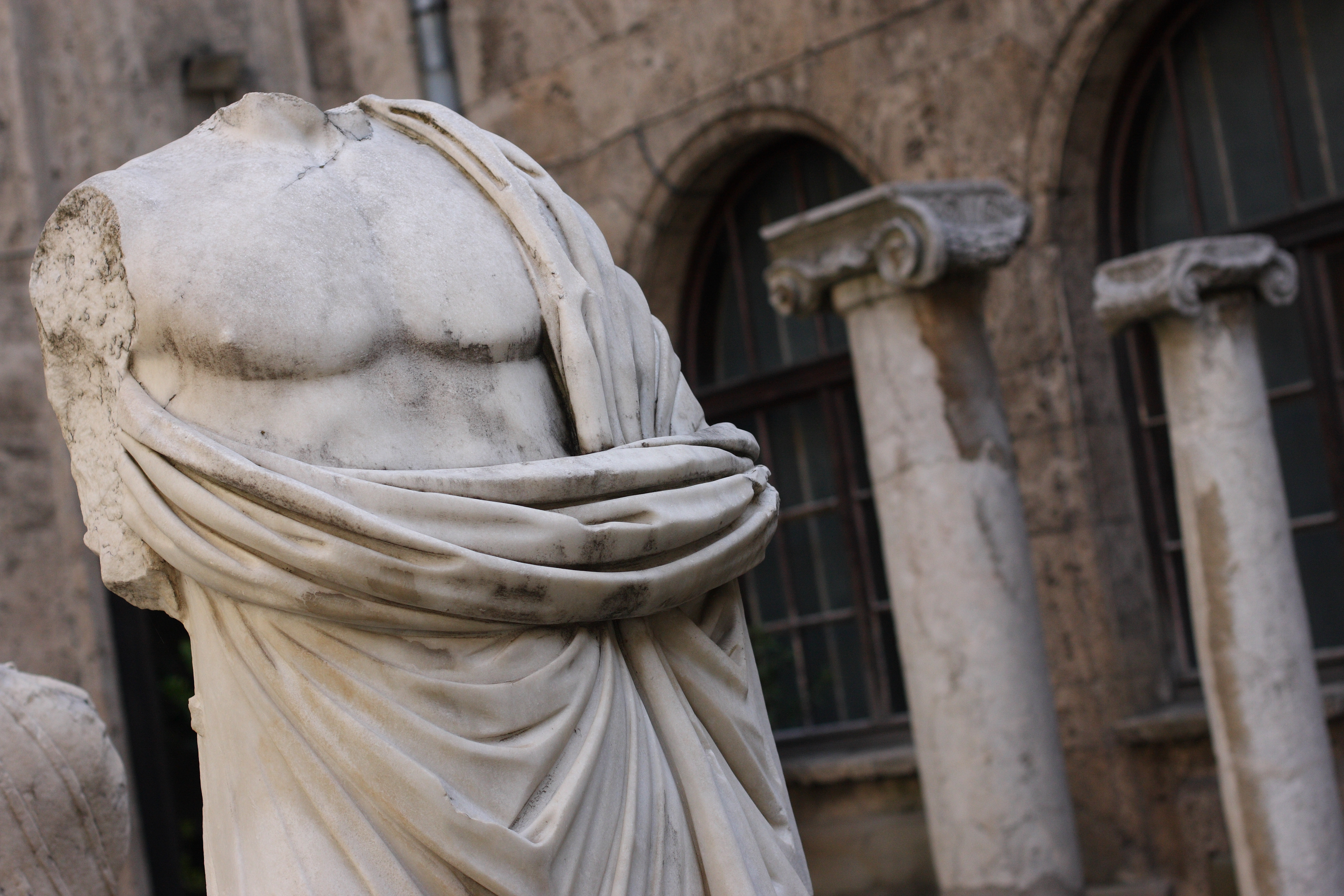 Veliko Tarnovo Archaeological Museum, Bulgaria